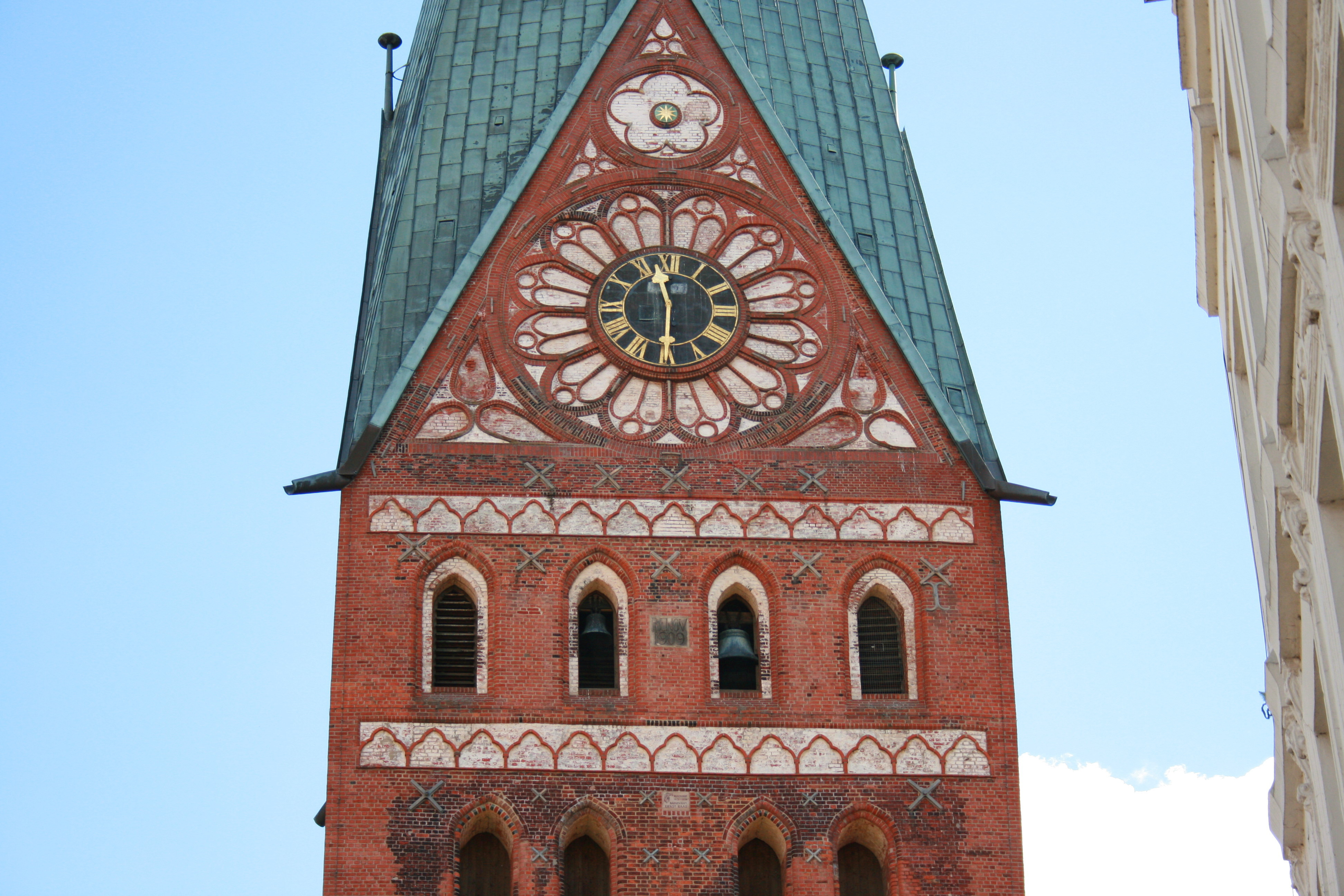 St. Johannis in Lüneburg